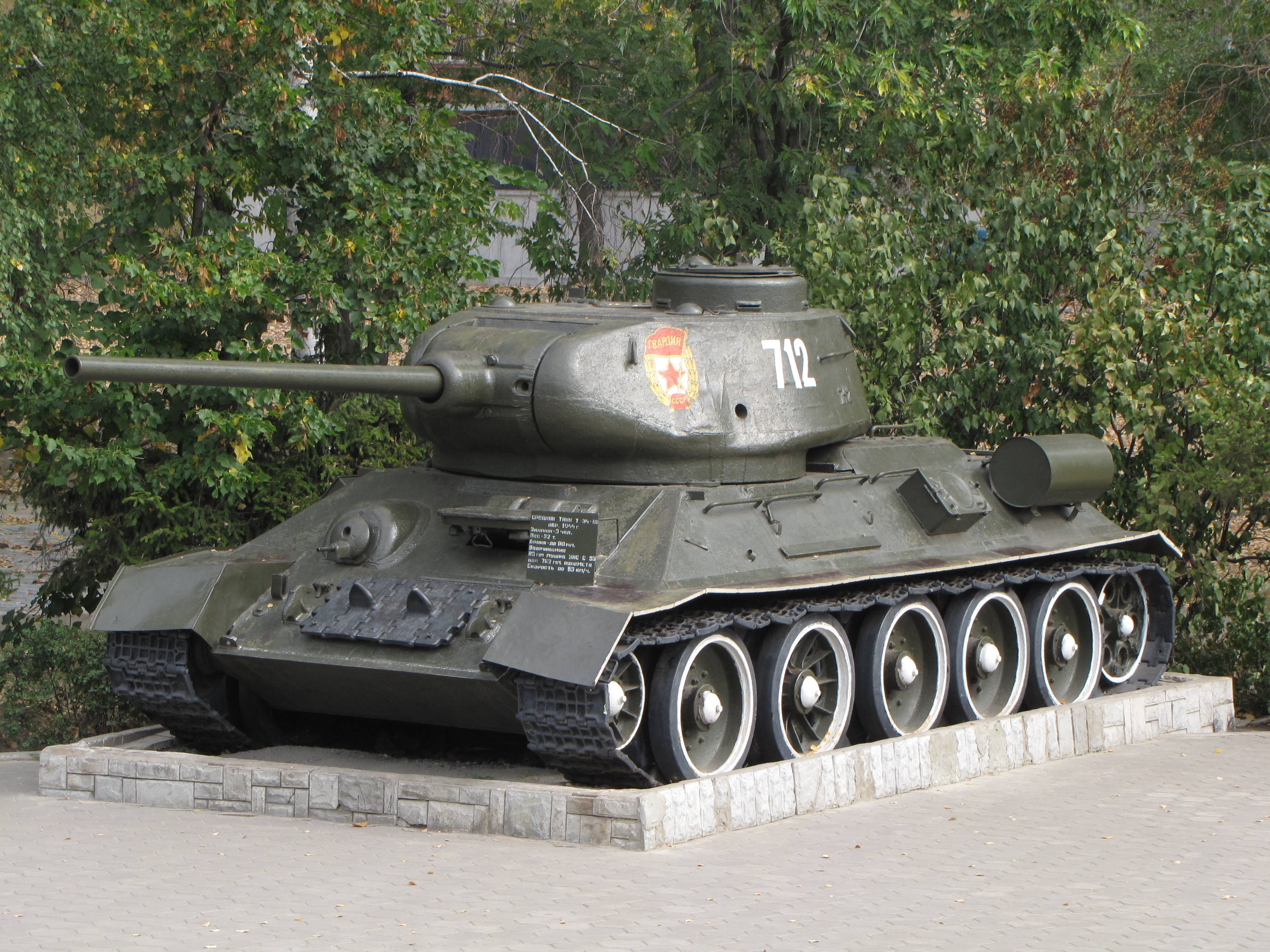 Т-34-85 обр.1944г. музей в Воронеже.